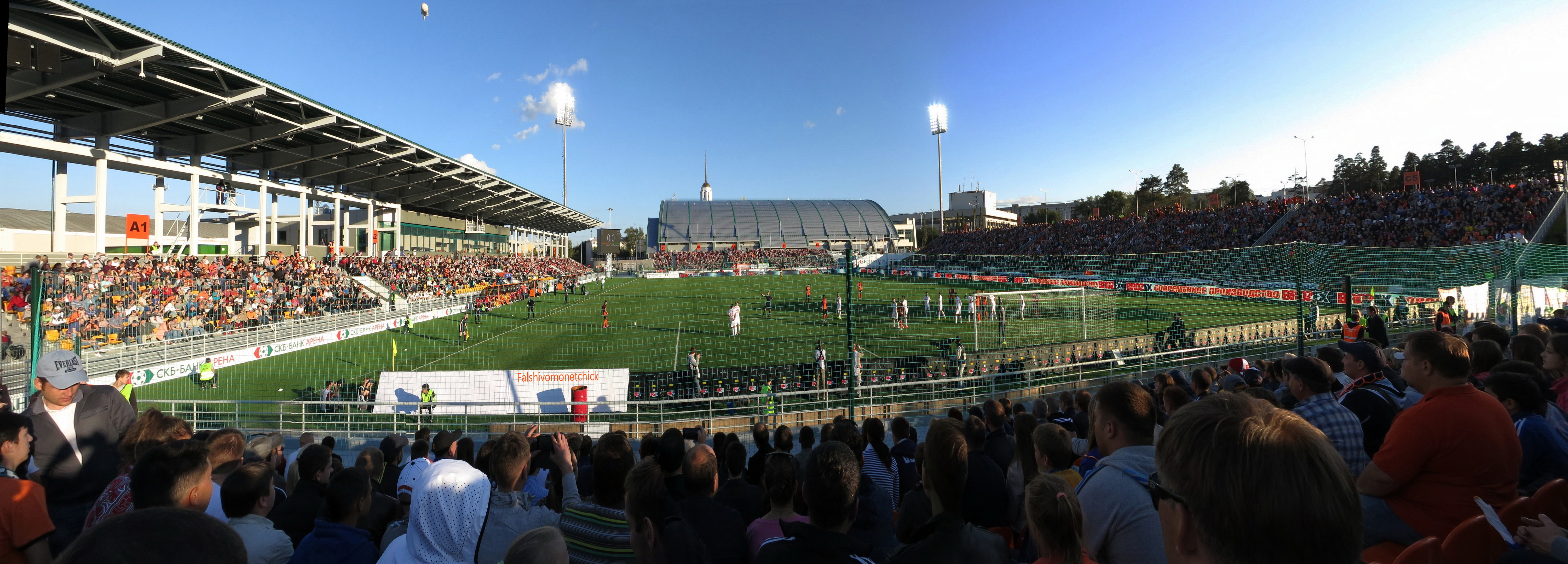 Стадион СКБ-Банк арена во время матча "Урал" - "Локомотив" 8 августа 2015г.